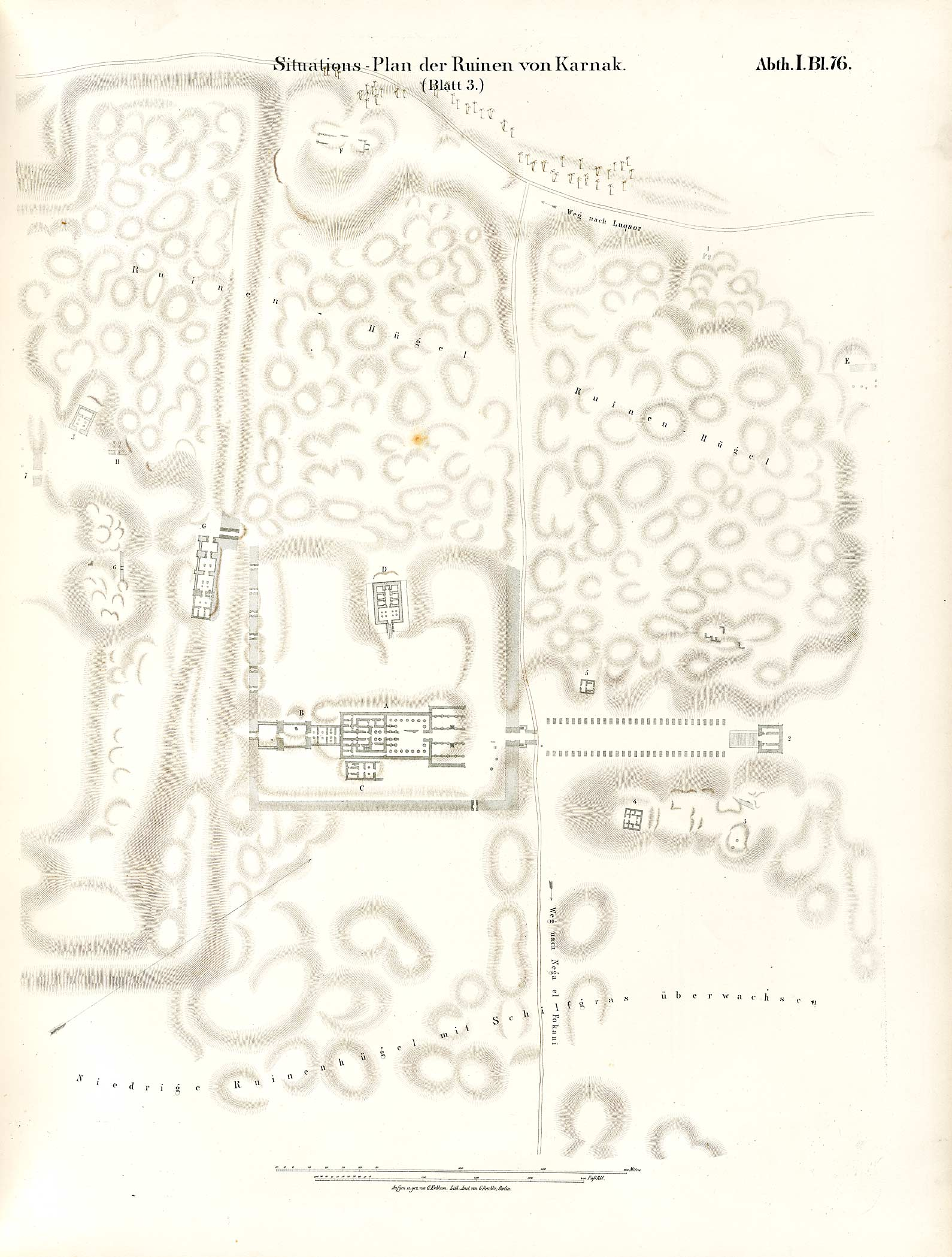 Denkmaeler aus Aegypten und Aethiopien nach den Zeichnungen der von Seiner Majestät dem Koenige von Preussen, Friedrich Wilhelm IV., nach diesen Ländern gesendeten, und in den Jahren 1842–1845 ausgeführten wissenschaftlichen Expedition auf Befehl Seiner Majestät